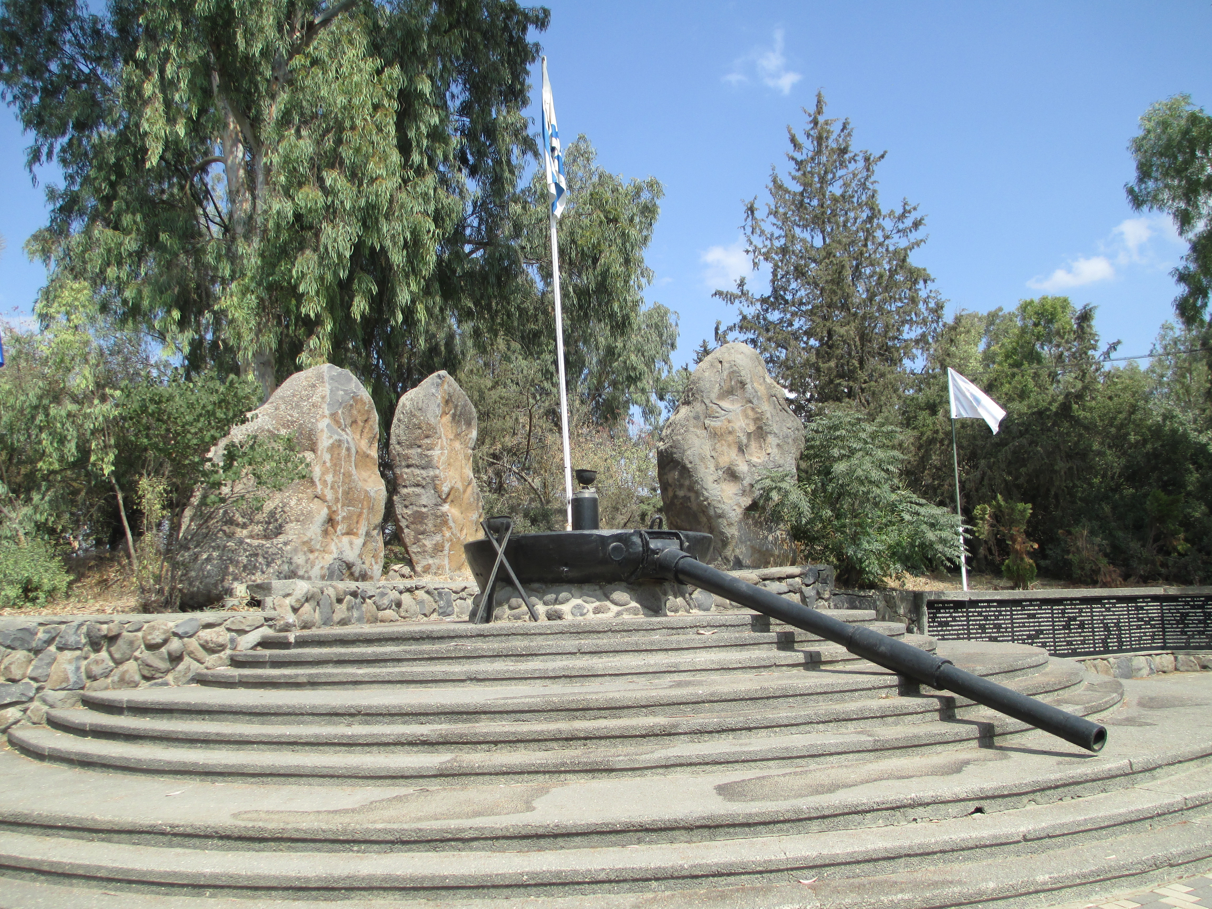 אתר הזיכרון המרכזי של חטיבת ברק ברמת הגולן